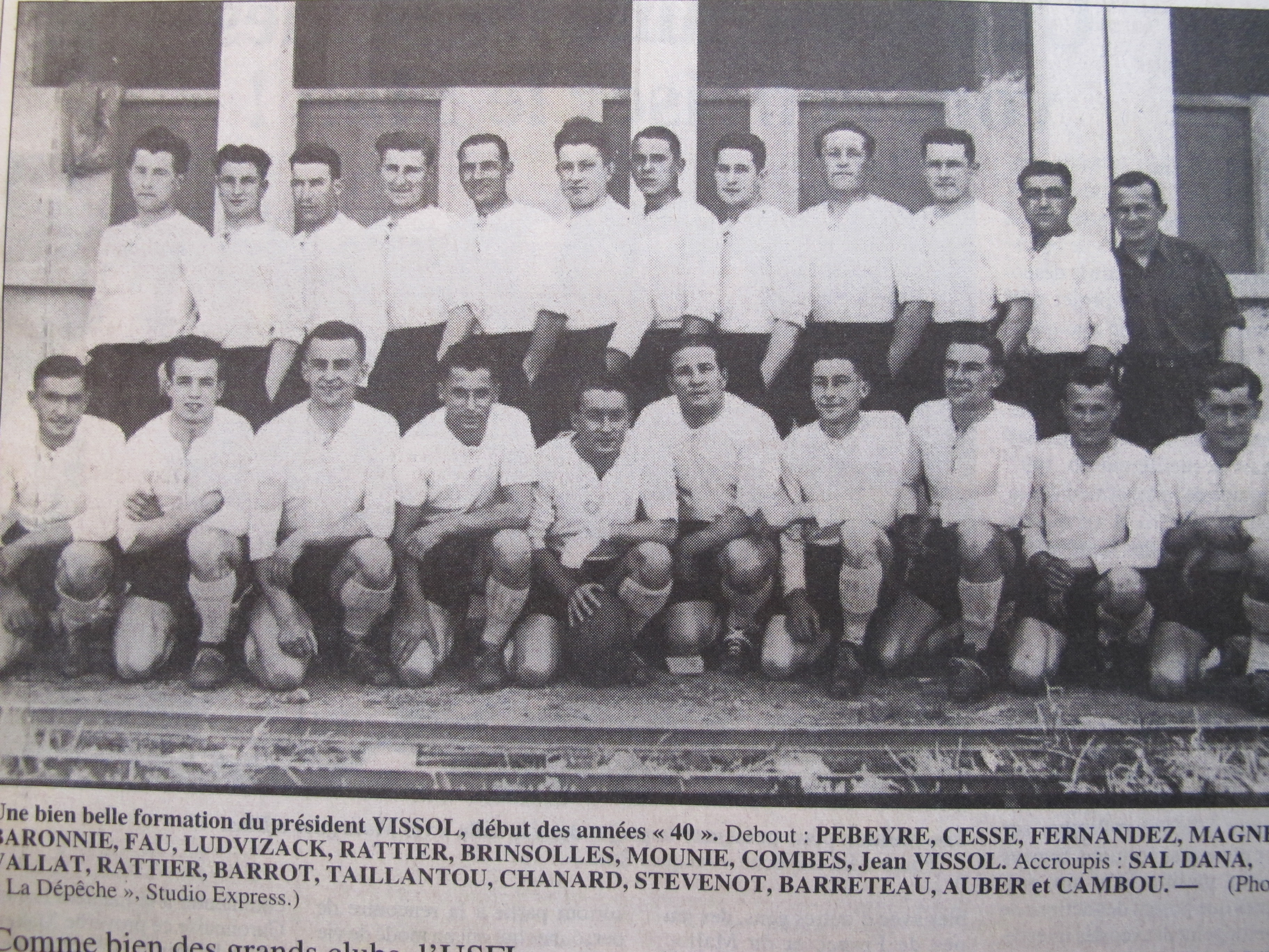 USFL Années 1940